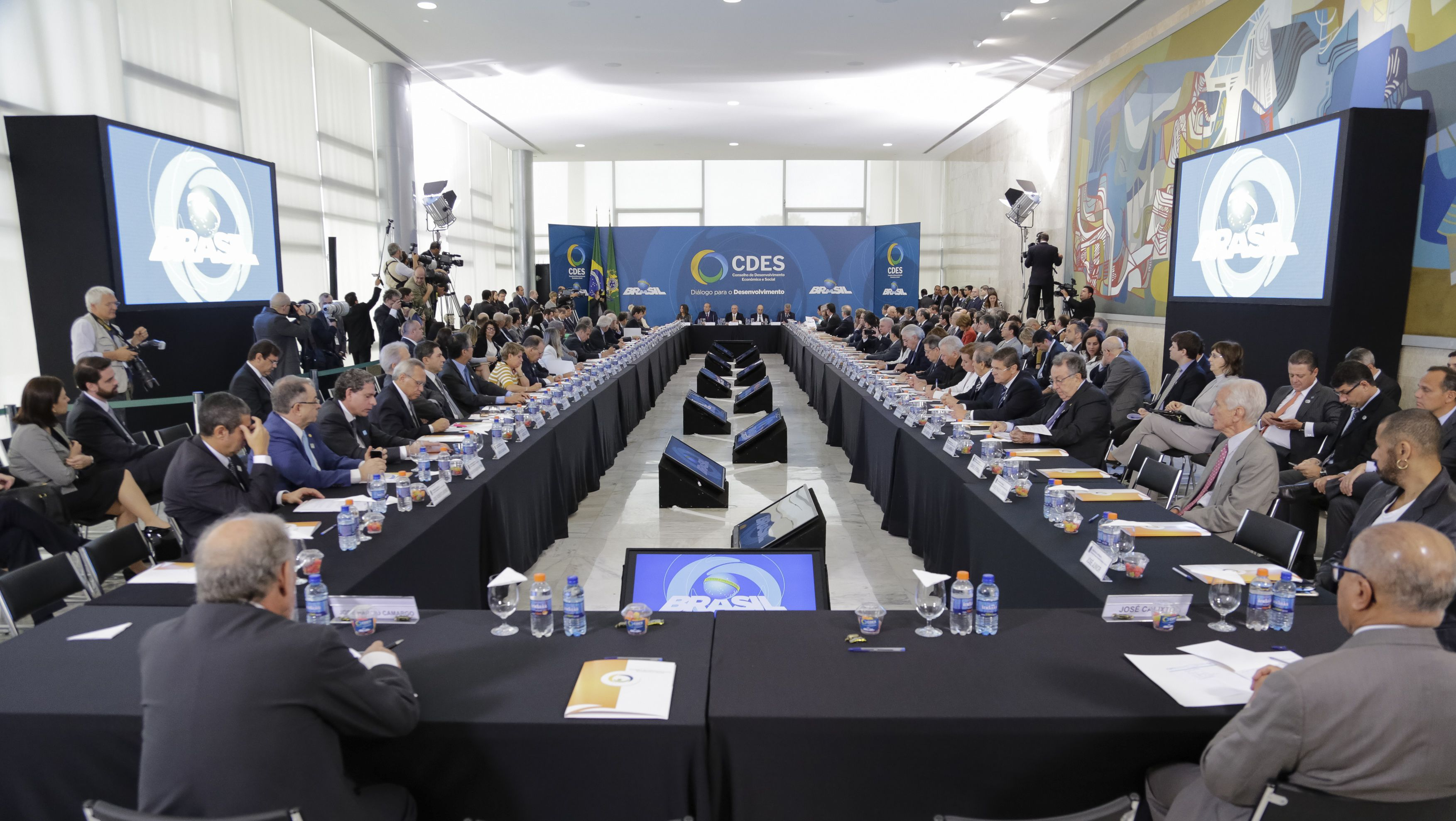 Reunião do Conselho de Desenvolvimento Econômico e Social, no Palácio do Planalto